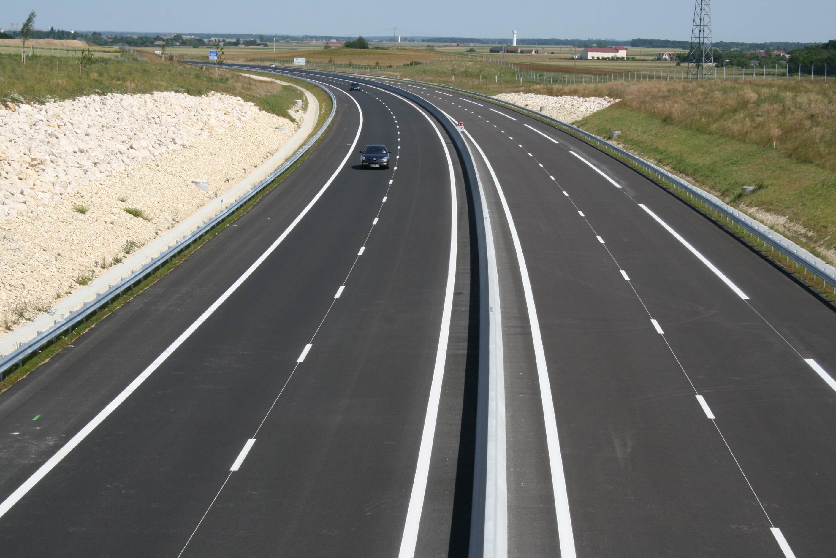 Autoroute A19 – Vue de la section courante après mise en service